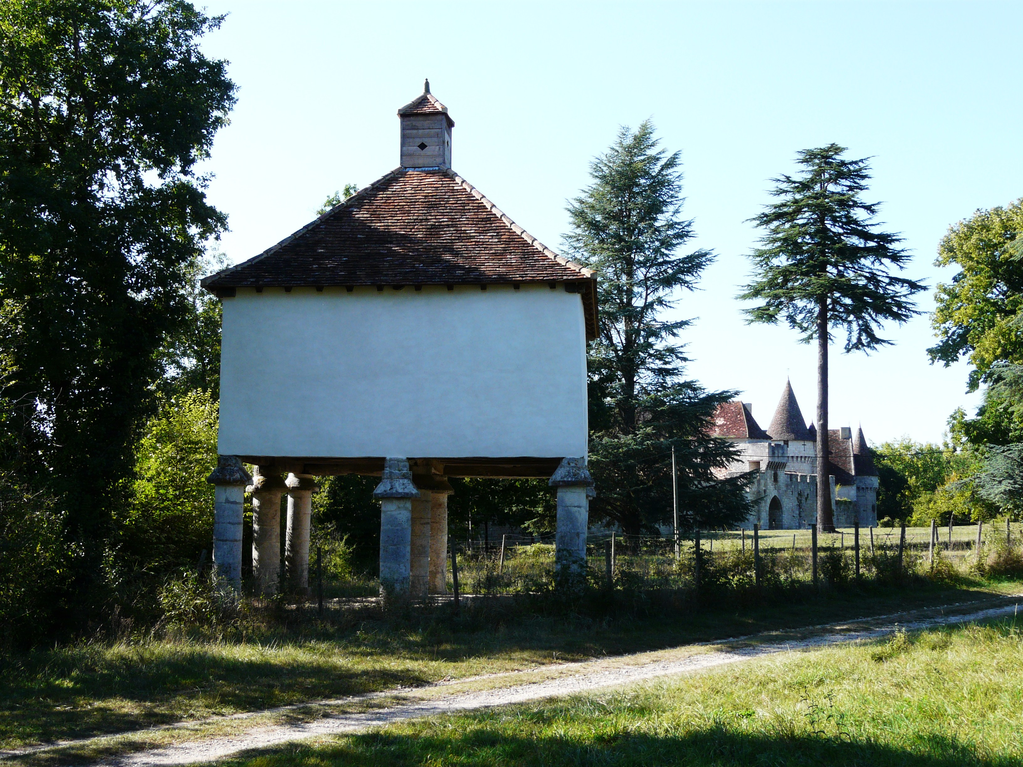 Le pigeonnier et le château de Bridoire, Ribagnac, Dordogne, France